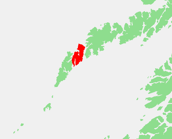 Norway_-_Flakstadoy.png